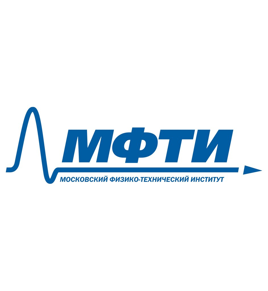 Эмблема МФТИ